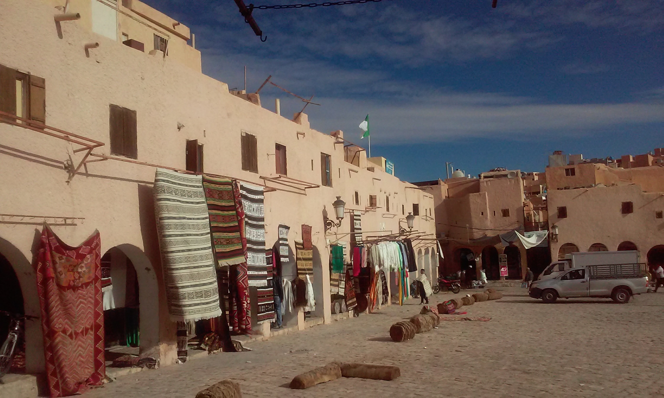 سوق الحرف والصناعات التقليدية في غرداية